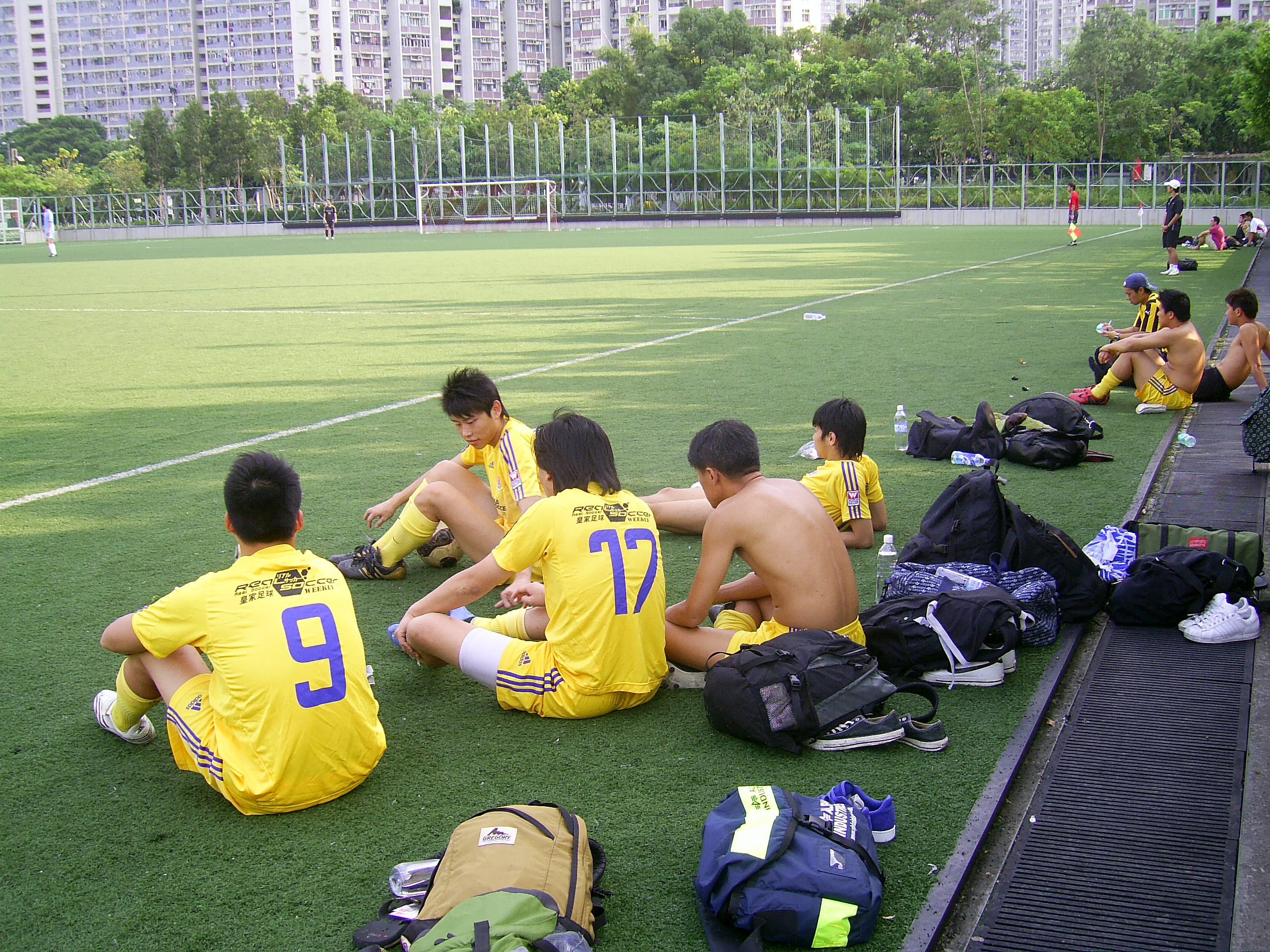 中文（香港）: 卜公後備球員